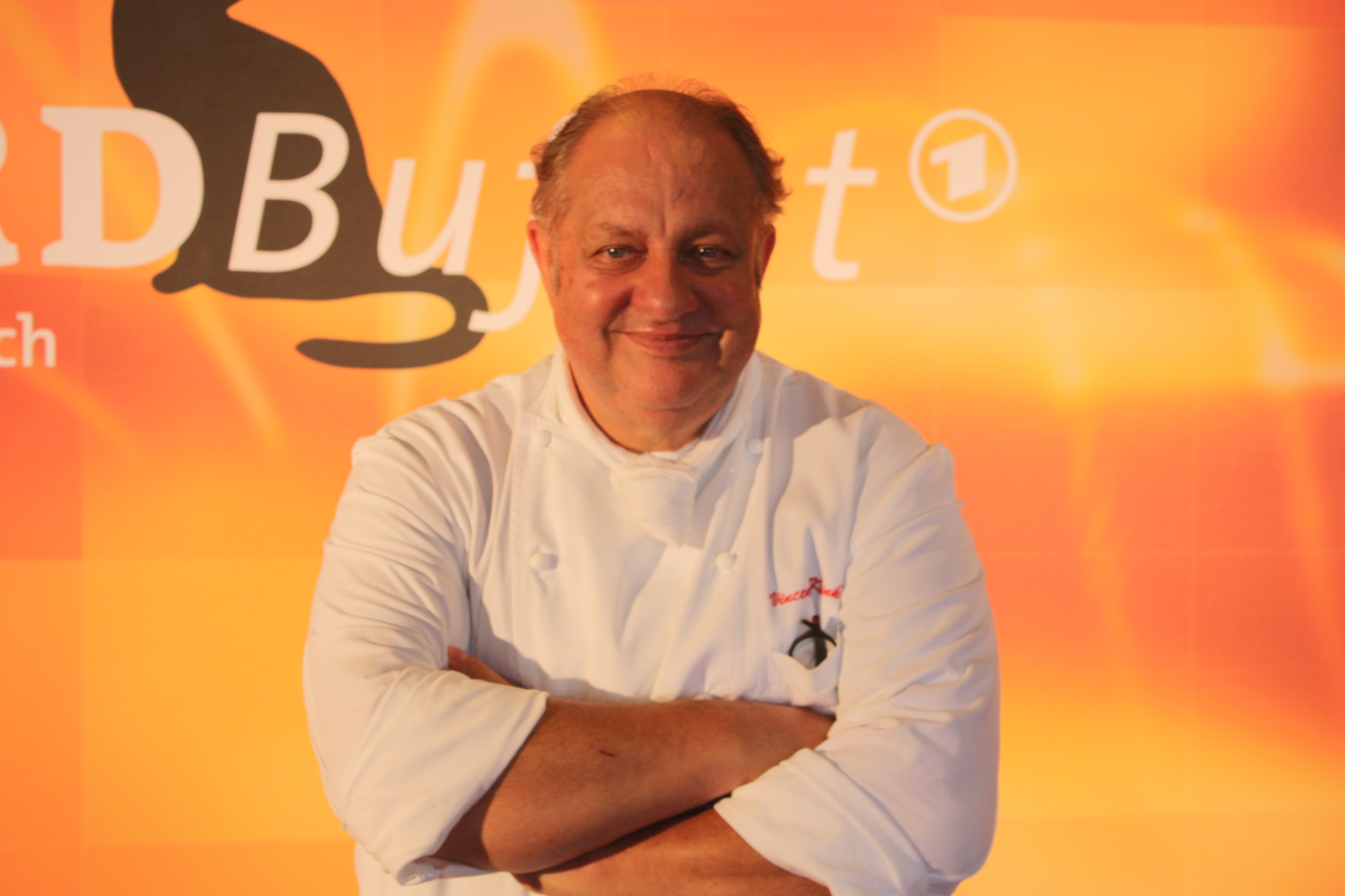 Internationale Funkausstellung 2012 , ARD-Buffet